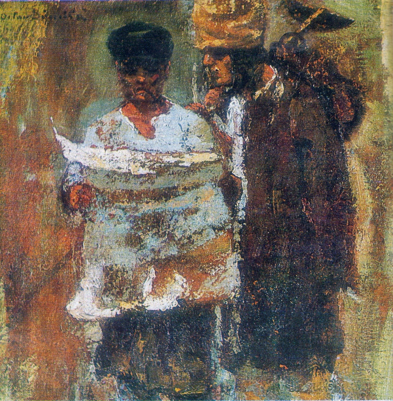 Muncitorul și țăranul